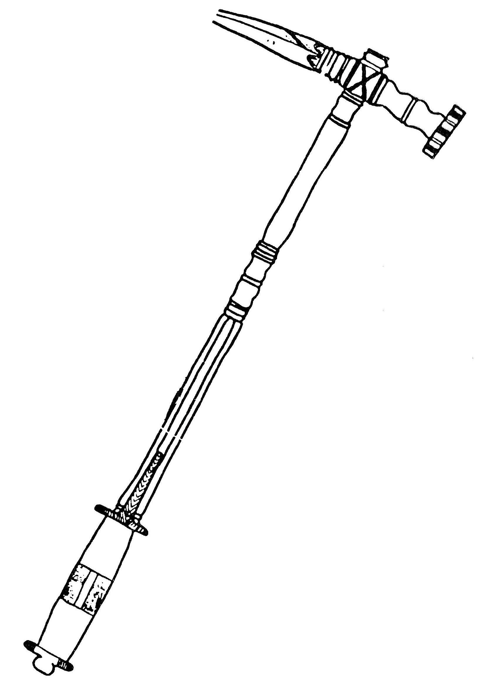 Stridhammer, Warhammer, drawn by Siver Aarflot